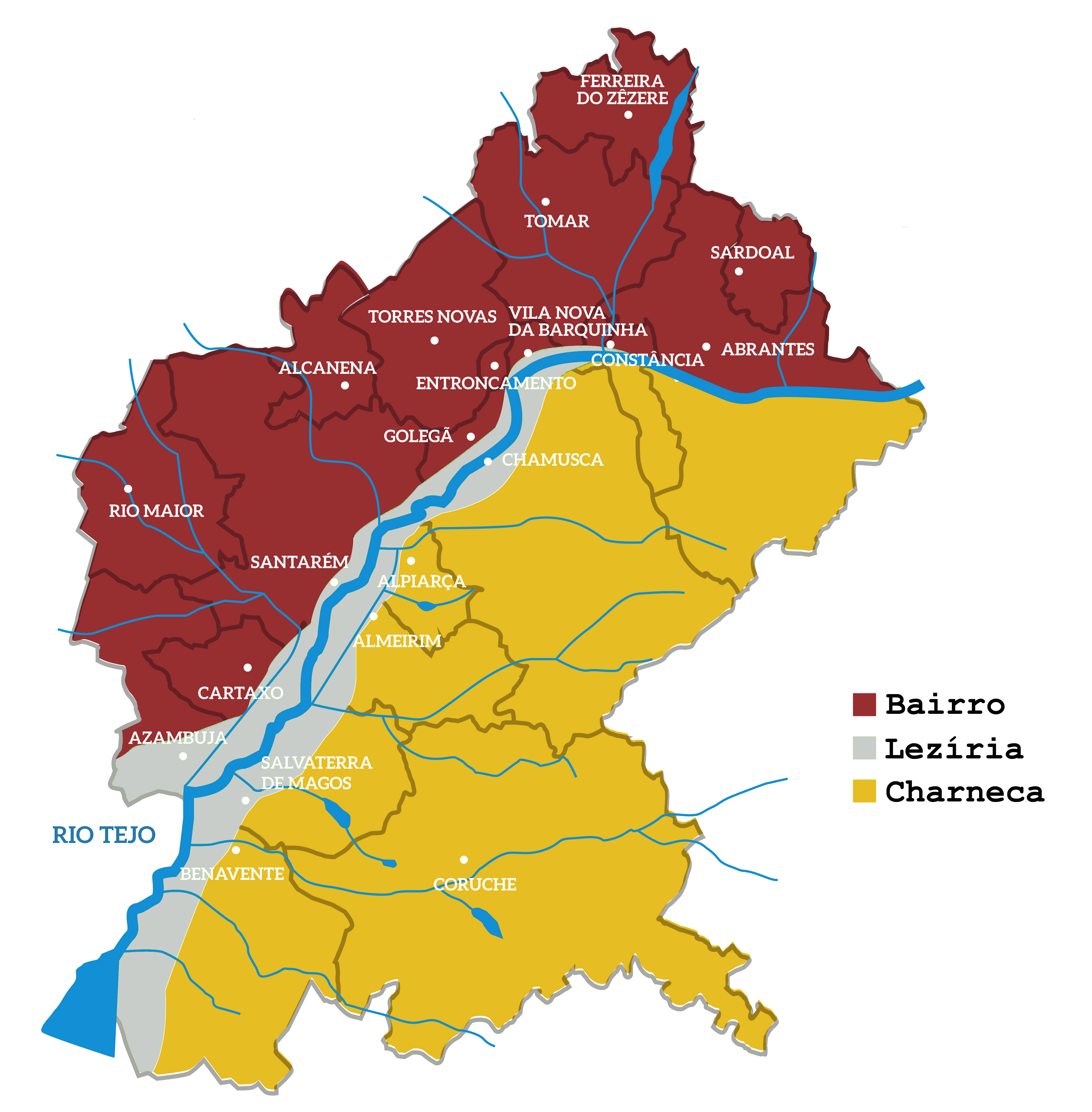 Mapa das Regiões do Ribatejo